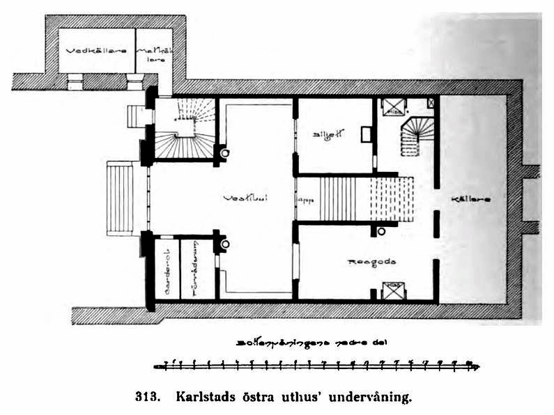 Skiss över Karlstad Östras bottenvåning